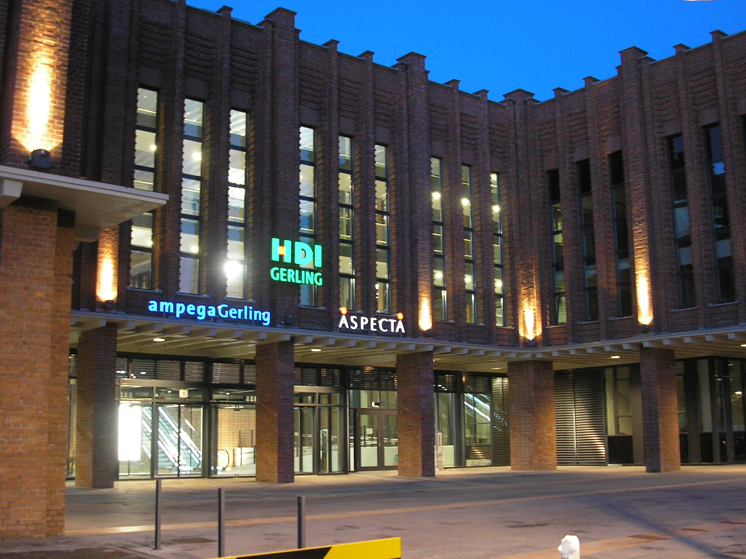 Haupteingang HDI-Gerling, neuer Verwaltungssitz in den umgebauten Rheinhallen, ehemals koelnmesse.